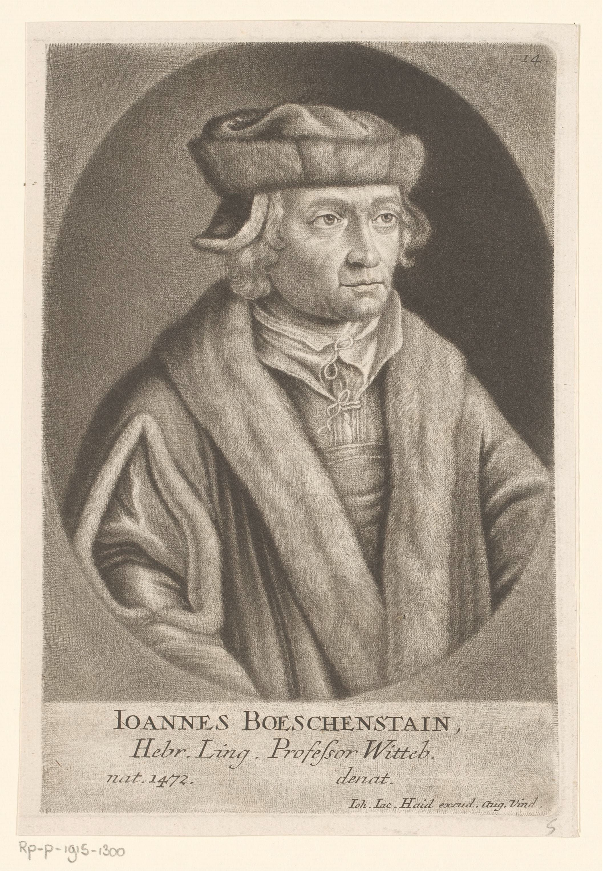 IdentificatieTitel(s): Portret van Johann BöschensteinObjecttype: prent Objectnummer: RP-P-1915-1300Catalogusreferentie: HAB A 1803Opschriften / Merken: verzamelaarsmerk, verso, gestempeld: Lugt 2228Omschrijving: Rechtsboven genummerd: 14.VervaardigingVervaardiger: prentmaker: Johann Jacob Haid (mogelijk)uitgever: Johann Jacob Haid (vermeld op object)Plaats vervaardiging: AugsburgDatering: 1747Materiaal: papier Techniek: mezzotintAfmetingen: plaatrand: h 215 mm × b 150 mmToelichtingPrent gebruikt voor: Brucker, Jacob. Ehrentempel der Deutschen Gelehrsamkeit. Augsburg: Johann Jacob Haid, 1747.OnderwerpWat: historical personsWie: Johann BöschensteinVerwerving en rechtenVerwerving: aankoop 1905Copyright: Publiek domein